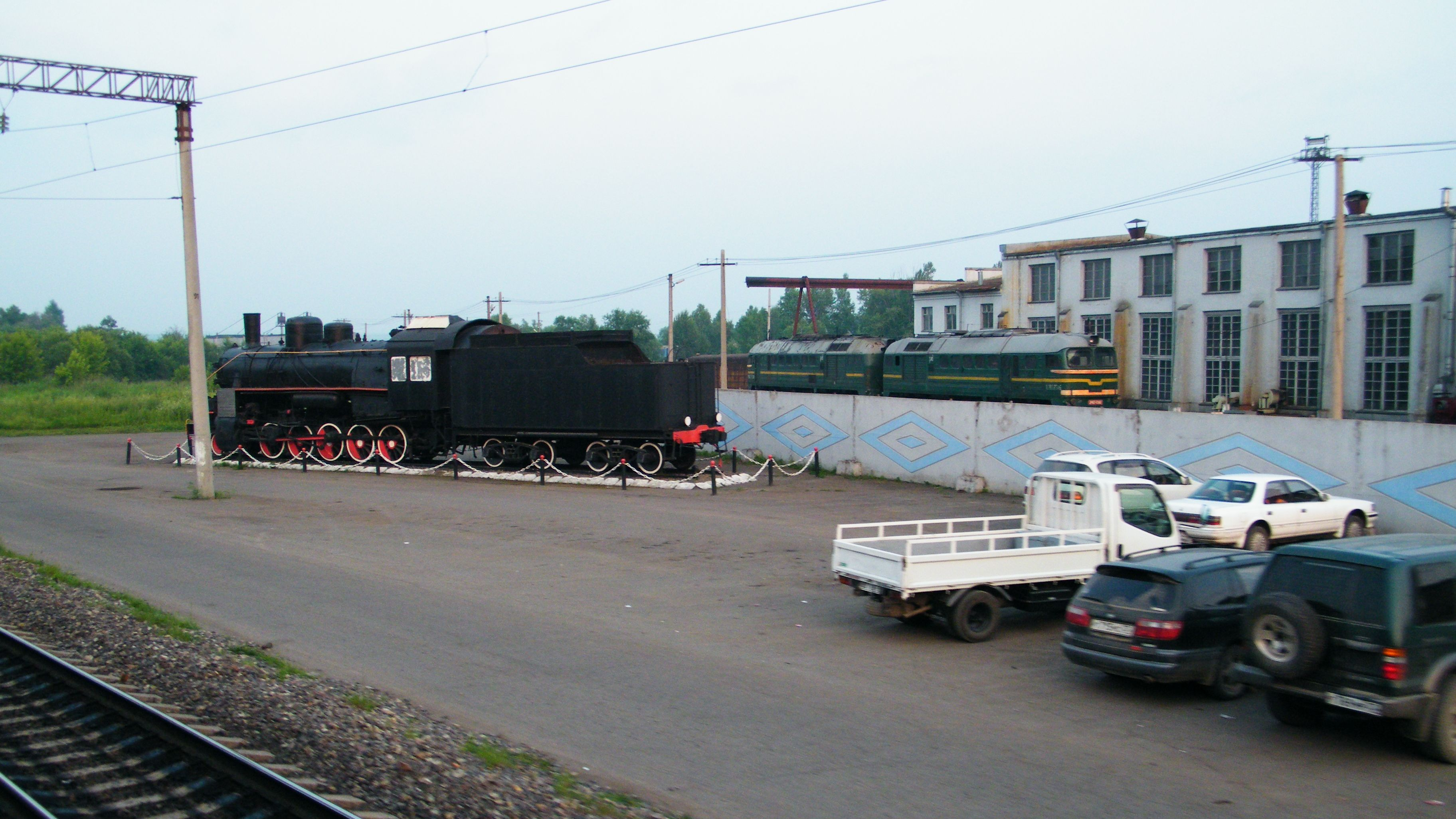 Станция Вяземская, паровоз Ем−3931